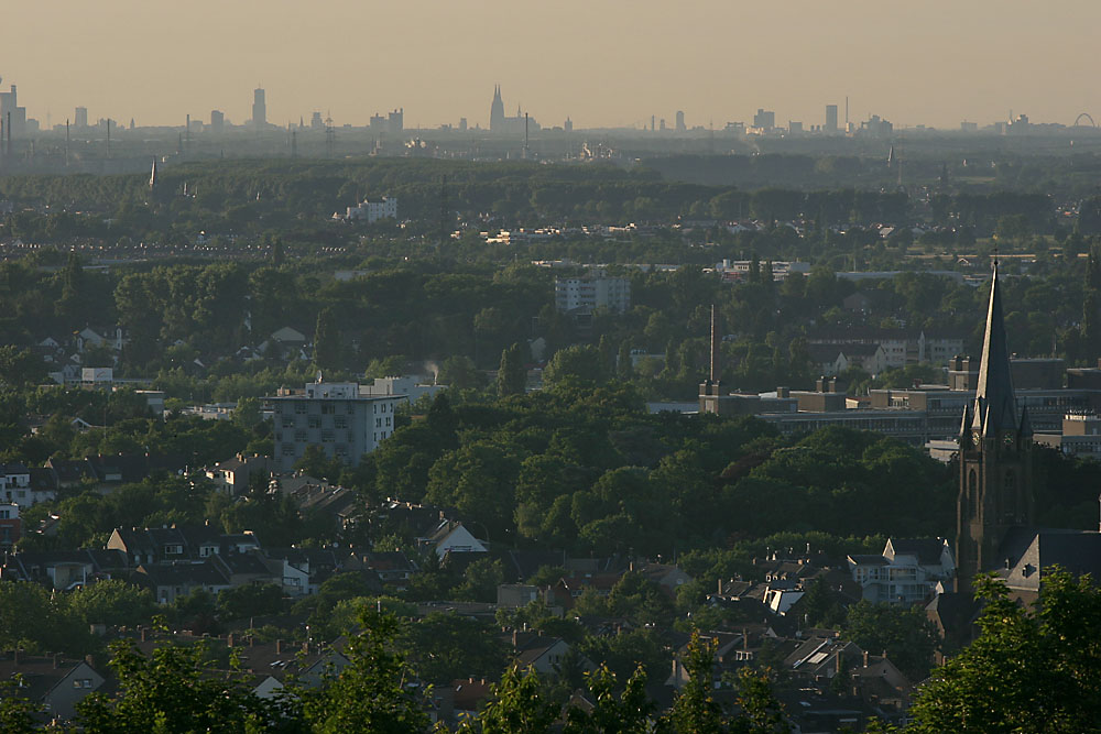 Bonn-Endenich vom Kreuzberg aus gesehen. Im Hintergrund die Silhouette von Köln.